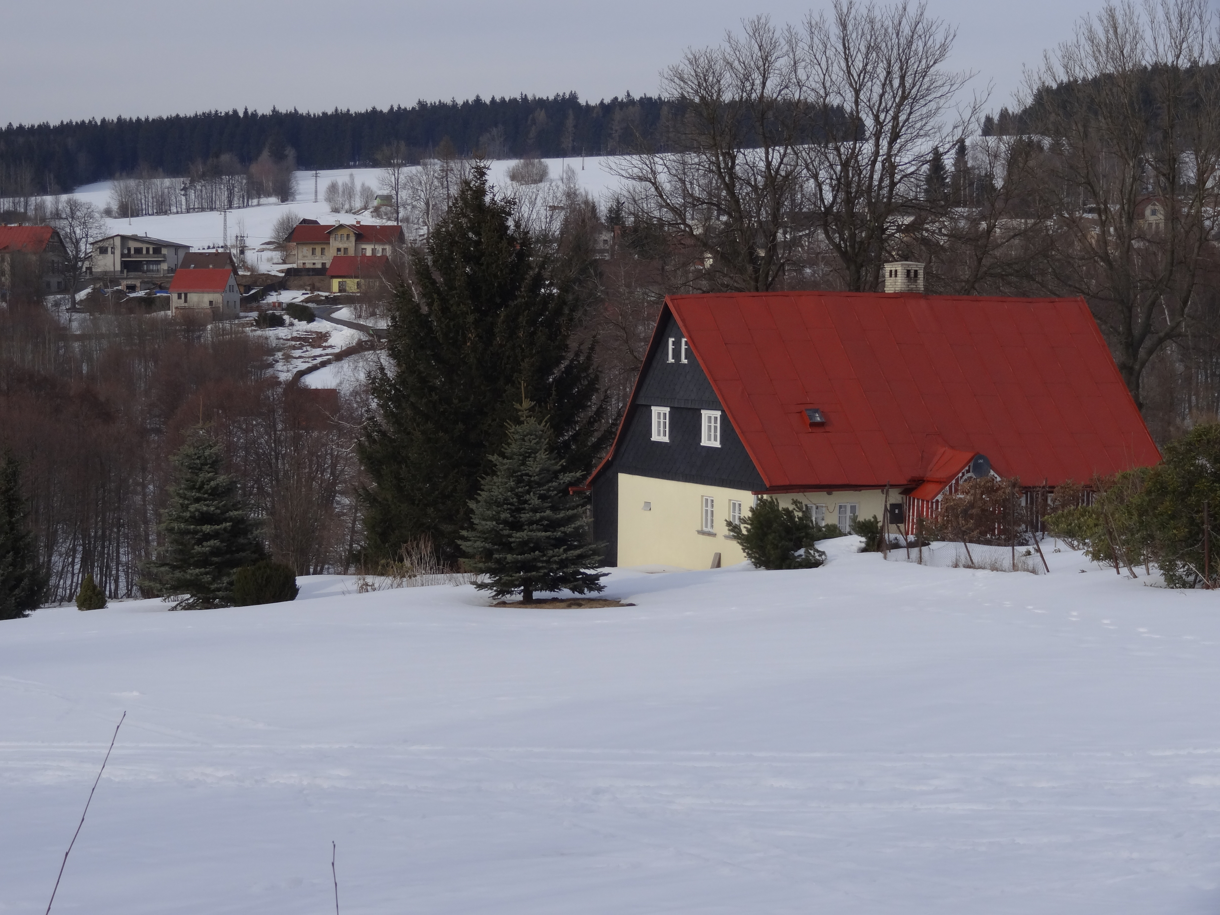 Maršovice - pohled na ves od jihu, v popředí chalupa čp. 39